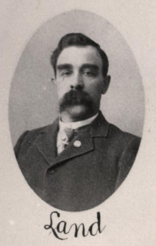 Sen Paul Land